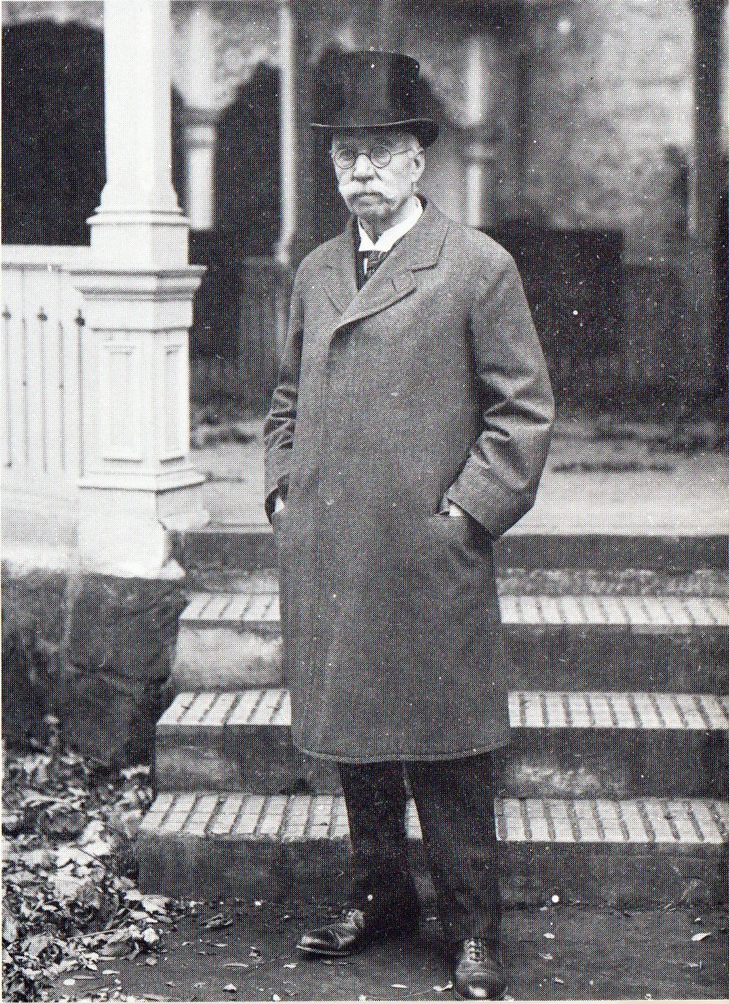 Carl Leonhard (1848-1930), Industrieller in Heidelberg (Direktor Portland-Cement-Werke) und Mäzen in Grünstadt